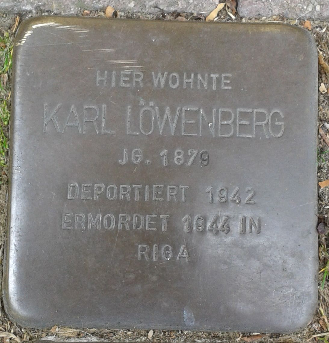 Stolperstein Datteln Marktstraße 5 Karl Löwenberg